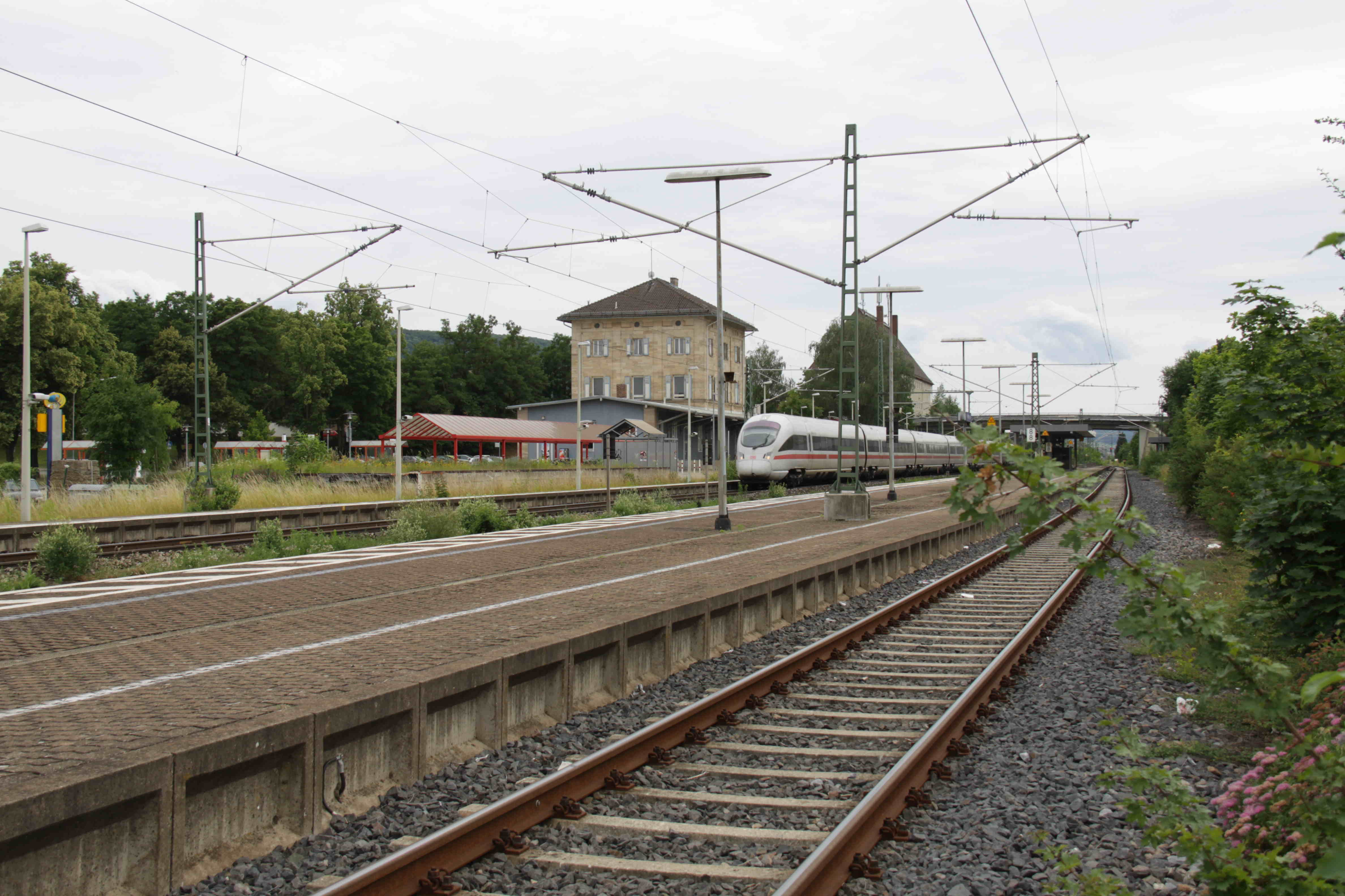 Bahnhof Weißenburg